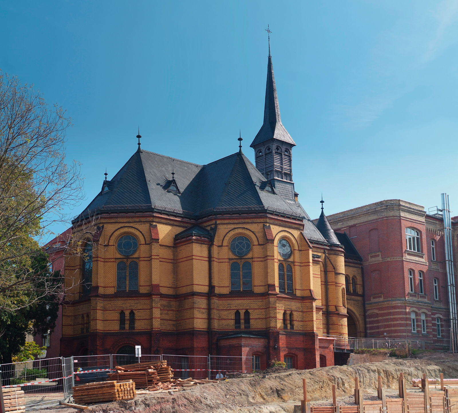 Diakoniekrankenhaus Halle